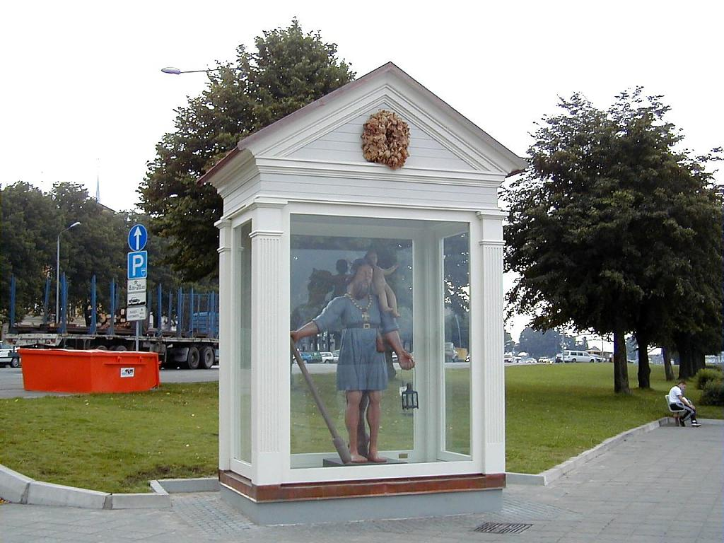 Rīgas vēstures piemineklis Lielais Kristaps 2001-08-21